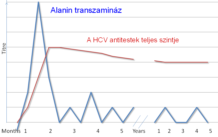 A Hepatitis C szerológiája.